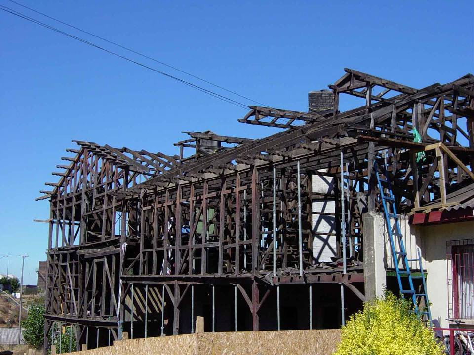 Recuperación Fachada This is a photo of a national monument in Chile: 2135